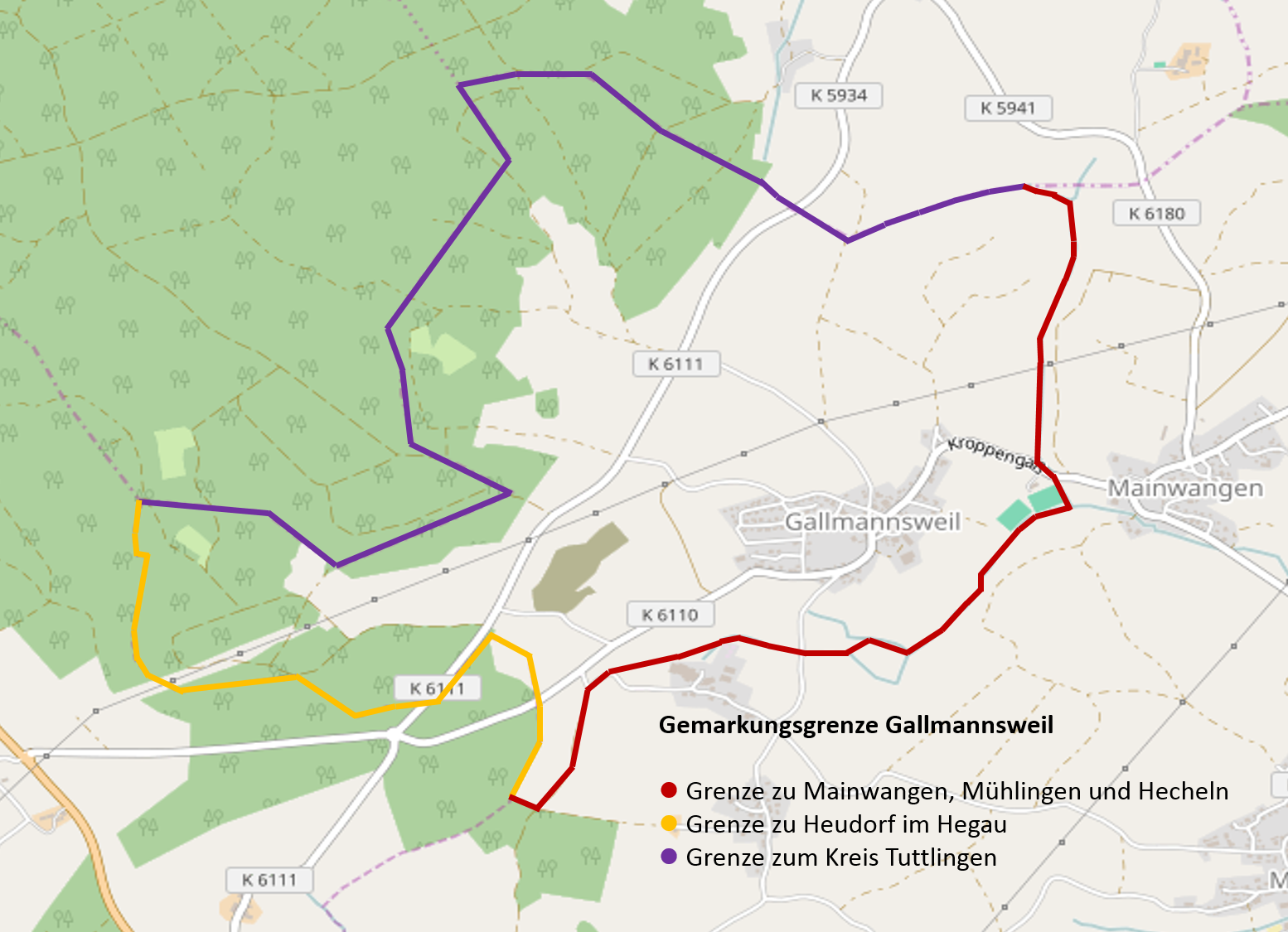 Deutschland (D) - Baden-Württemberg (BW) - Landkreis Konstanz (KN) - Gemeinde Mühlingen - Ortsteil Gallmannsweil: Gemarkungsgrenze